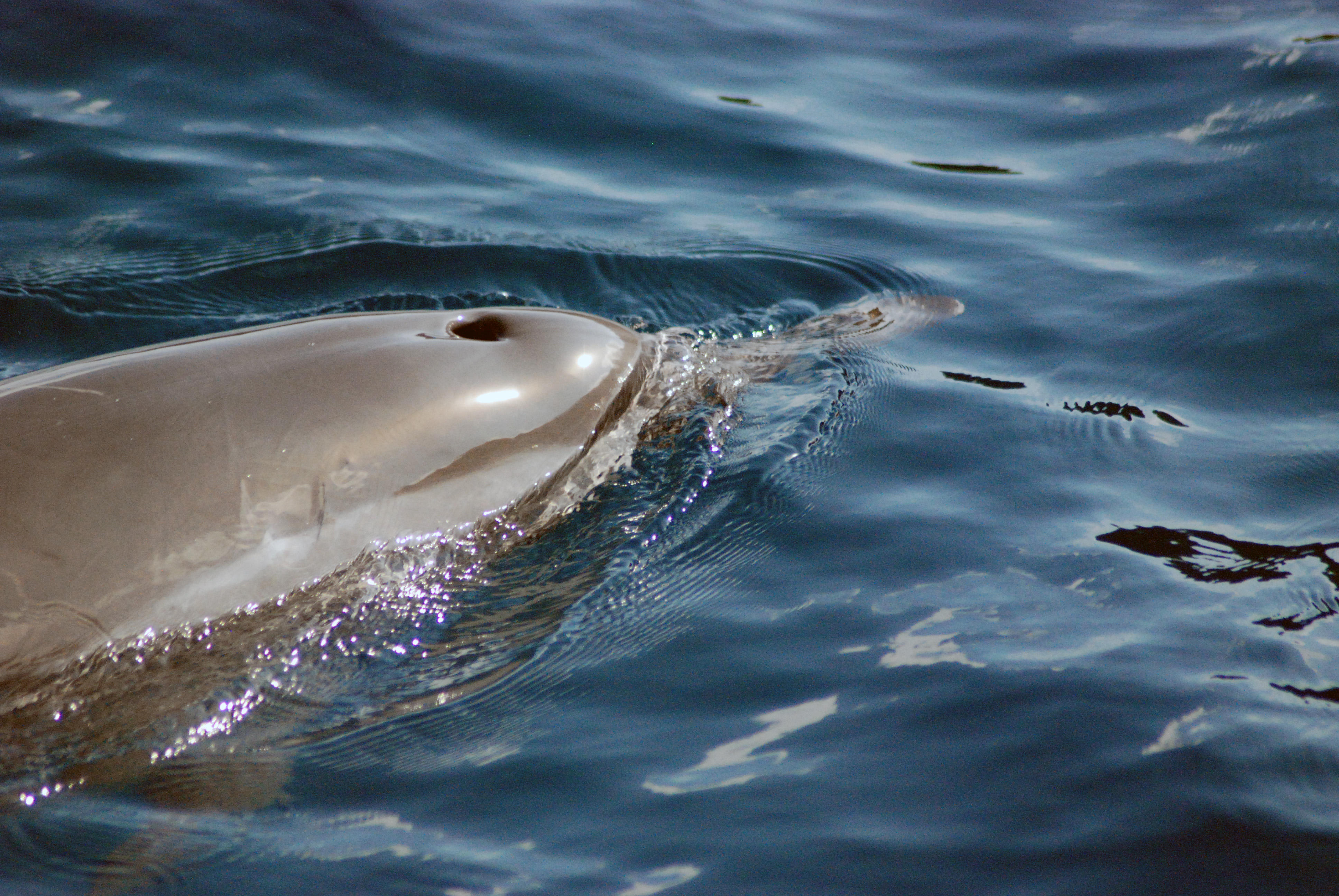 Detalhe da cabeça de um golfinho-rotador (Stenella longirostris) e seu orifício respiratório.